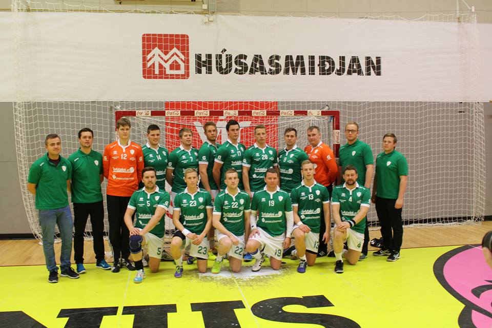 IF Mílan eftir fyrsta leik